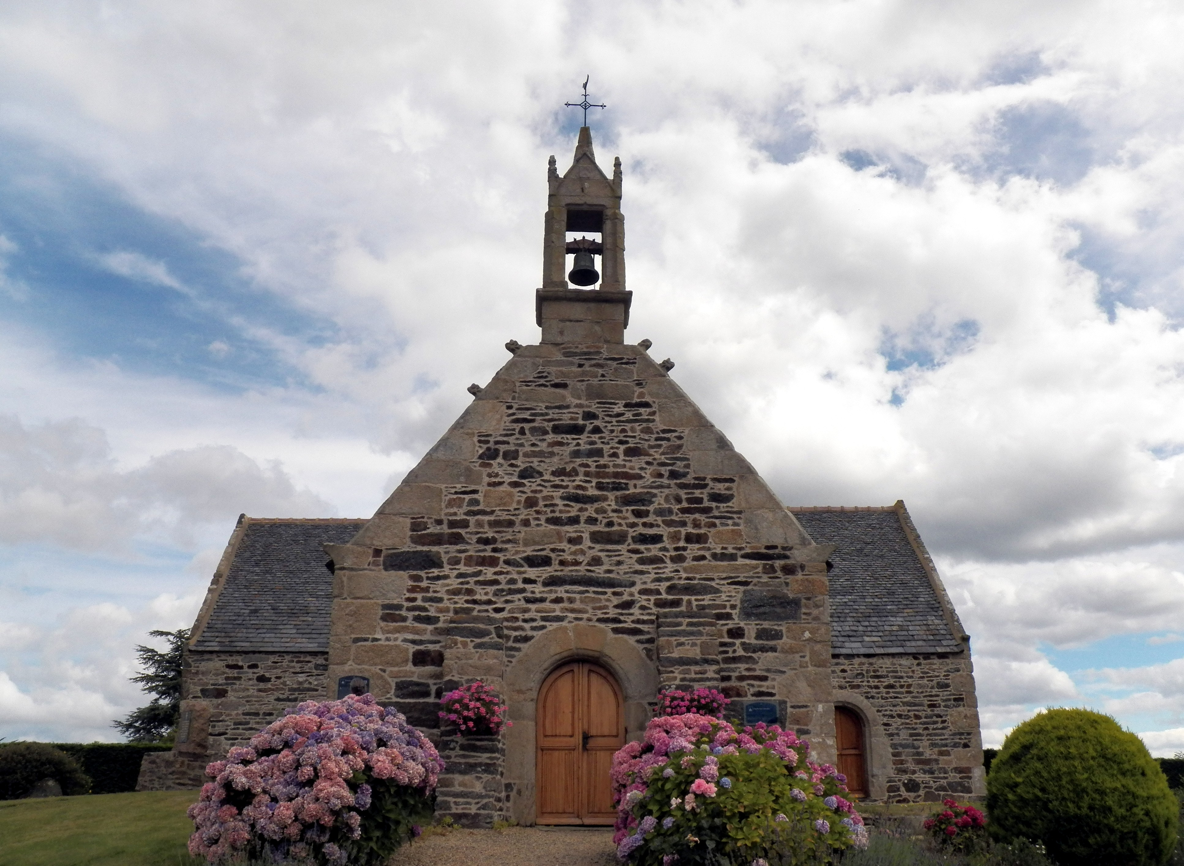 Chapelle de Saint Sébastien à l'écart du Plestin des Grèves dans lescotes d'Armor.